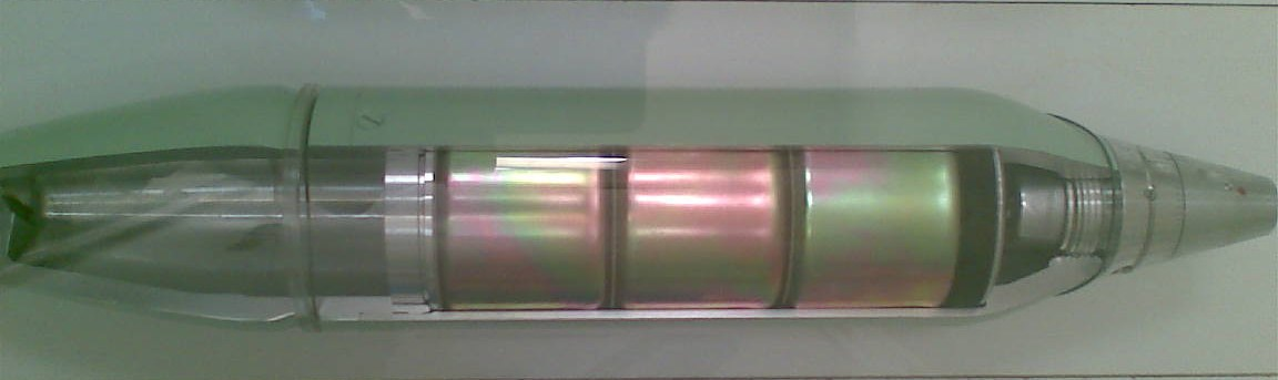 Nebelgranate (Granatwerfermunition)